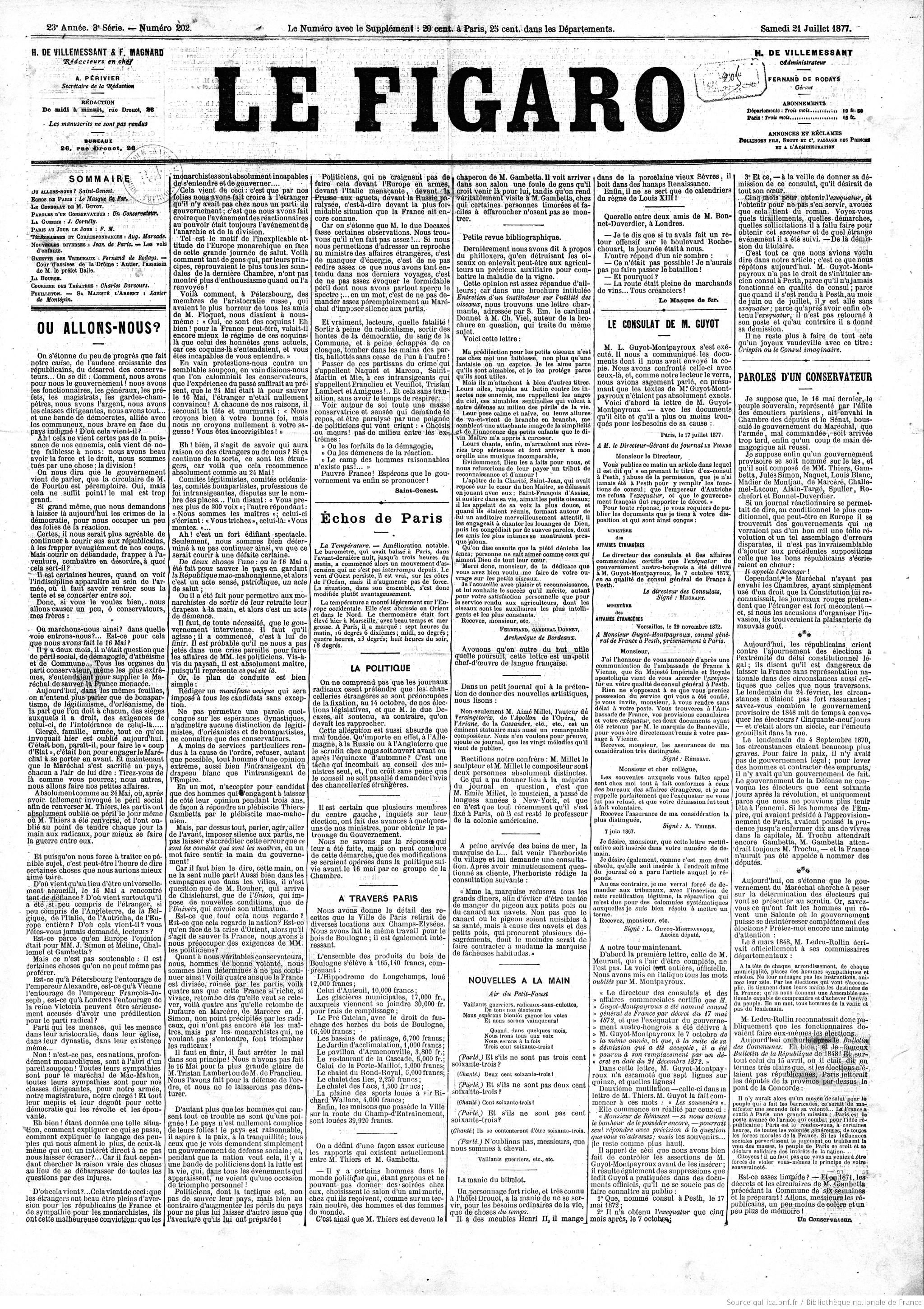 Première page du Figaro, contenant notamment un éditorial de Bucheron (alias Saint-Genest) relatif à la crise du 16 mai 1877.